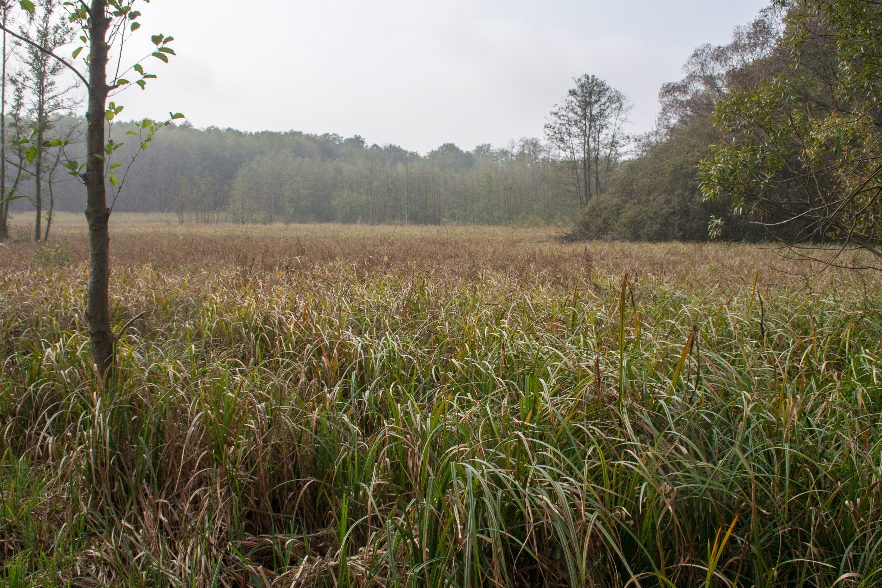 Spreewald, Aue, Spreewald Biosphere Reserve